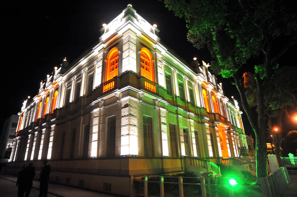 Inauguração do Museu da Gente Sergipana l Foto: Marcelle Cristine (ASN)